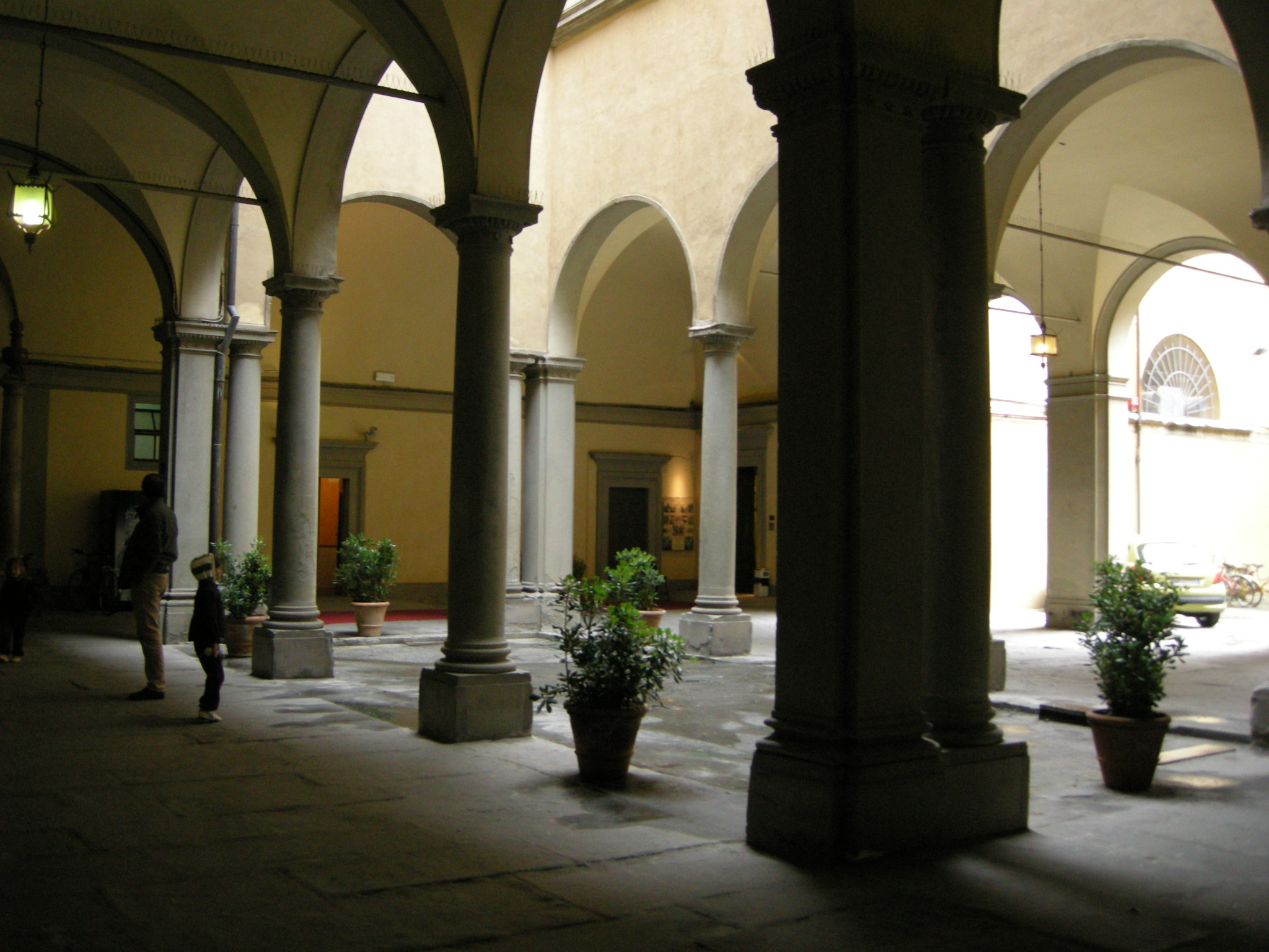 Palazzo torrigiani specola, cortile